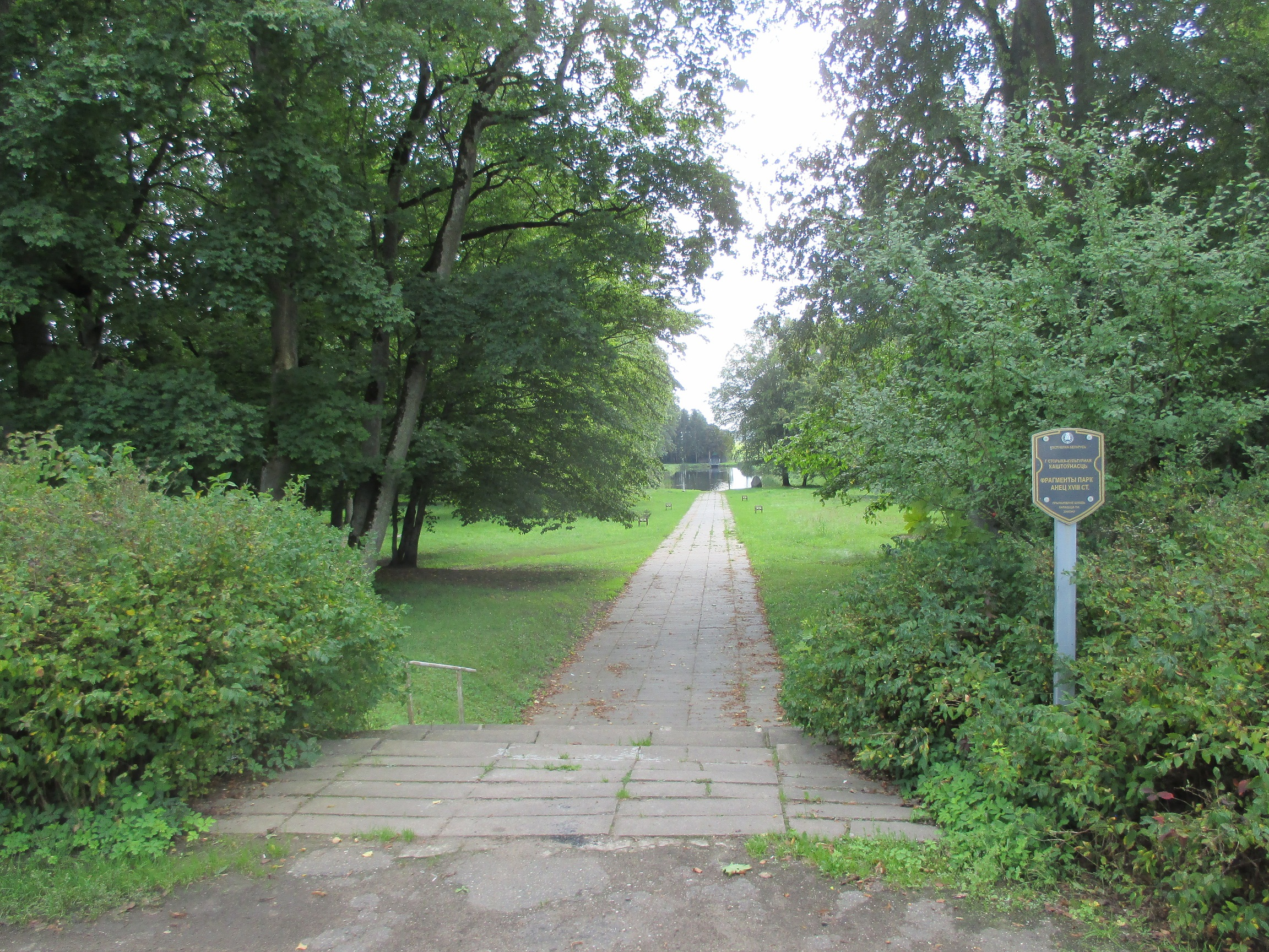 Пагародна, Воранаўскі раён. Парк, уваход